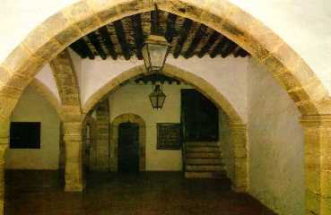 Casa de la Vila de Catí (l'Alt Maestrat, País Valencià). 02.042-010.